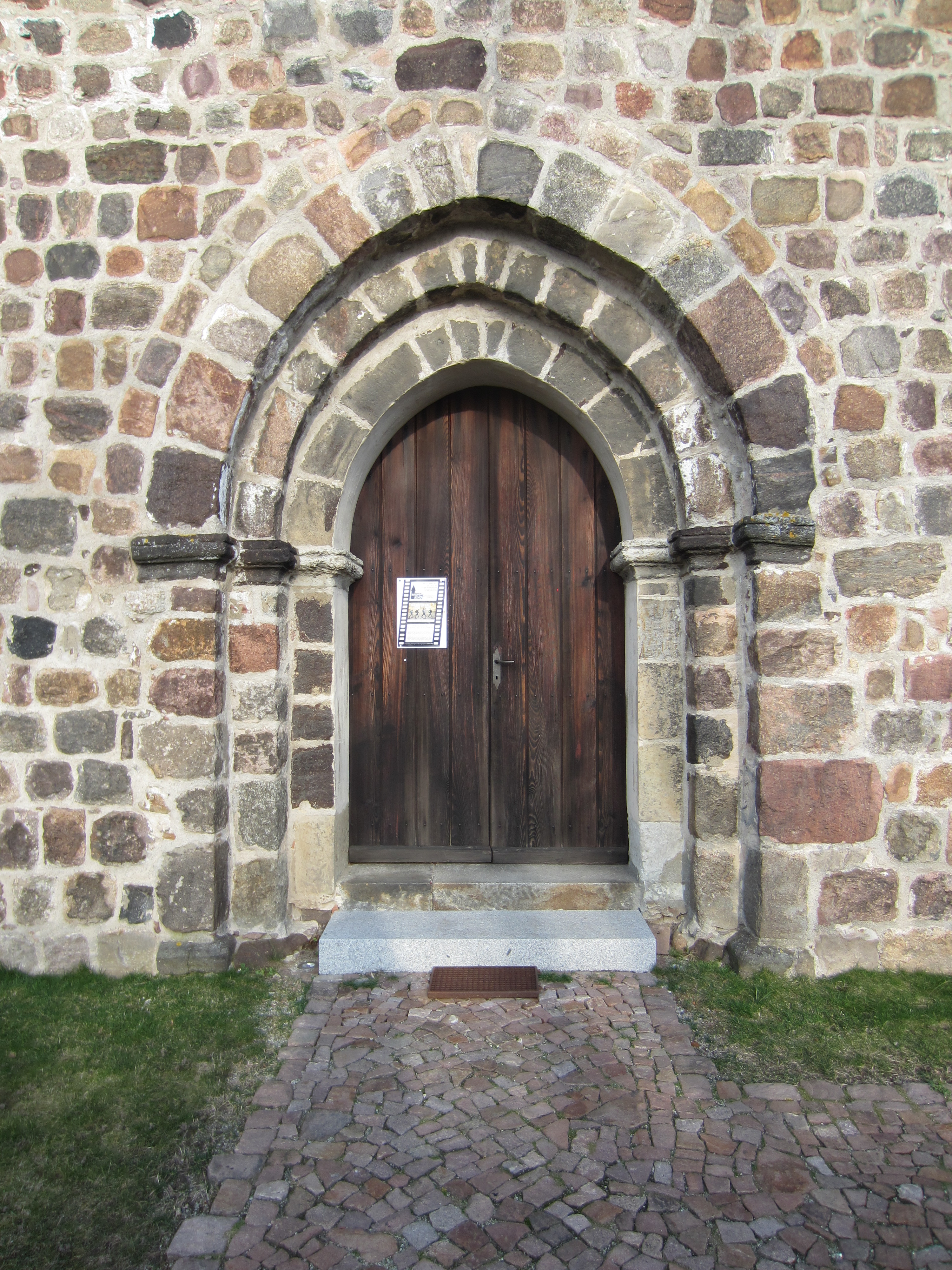 Riedebeck, Gemeinde Heideblick, denkmalgeschützte Dorfkirche, Westportal